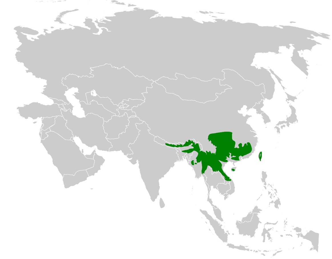 Abroscopus albogularis distribution map, based on